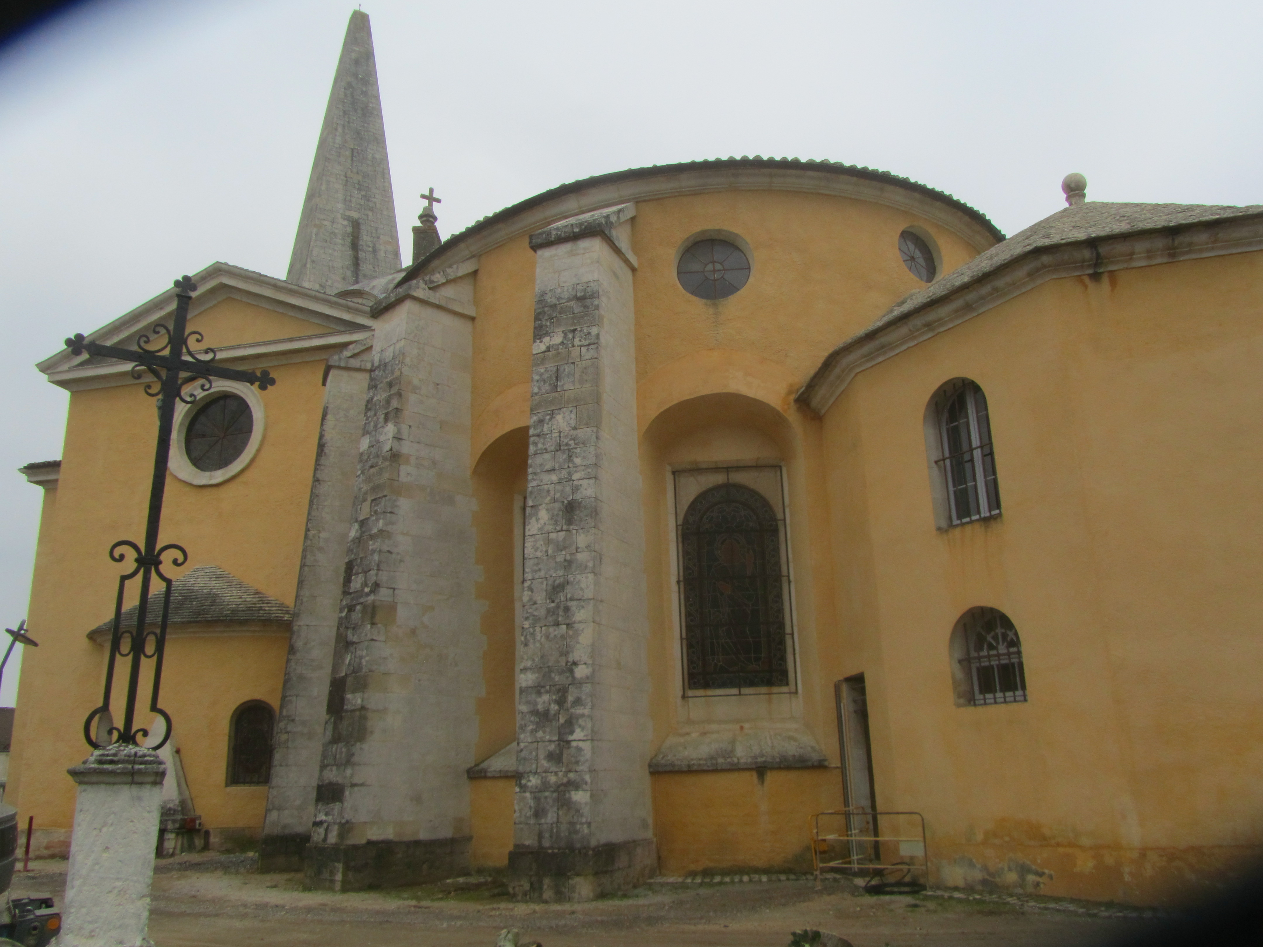 Vue extérieure de l'église de Givry : de la sacristie à droite au clocher à gauche